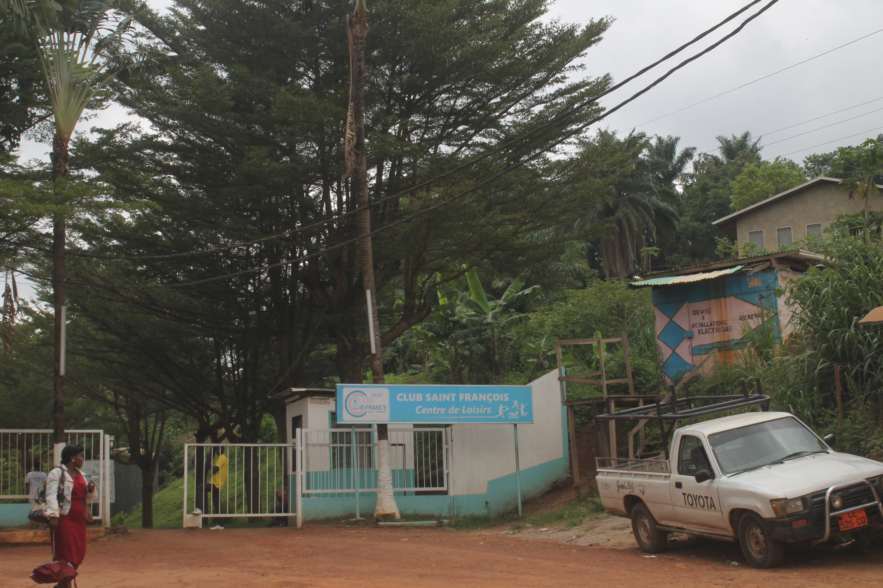 A l'entrée du club France. Yaoundé 3Neig